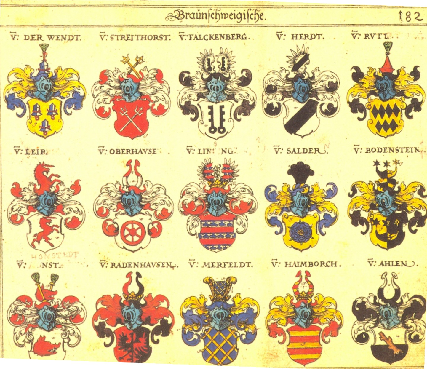 Johann Siebmacher: New Wappenbuch eingescannt aus: Horst Appuhn (Hrsg.), Johann Siebmachers Wappenbuch. Die bibliophilen Taschenbücher 538, 2. verb. Aufl , Dortmund 1989. Braunschweiger Blatt 182